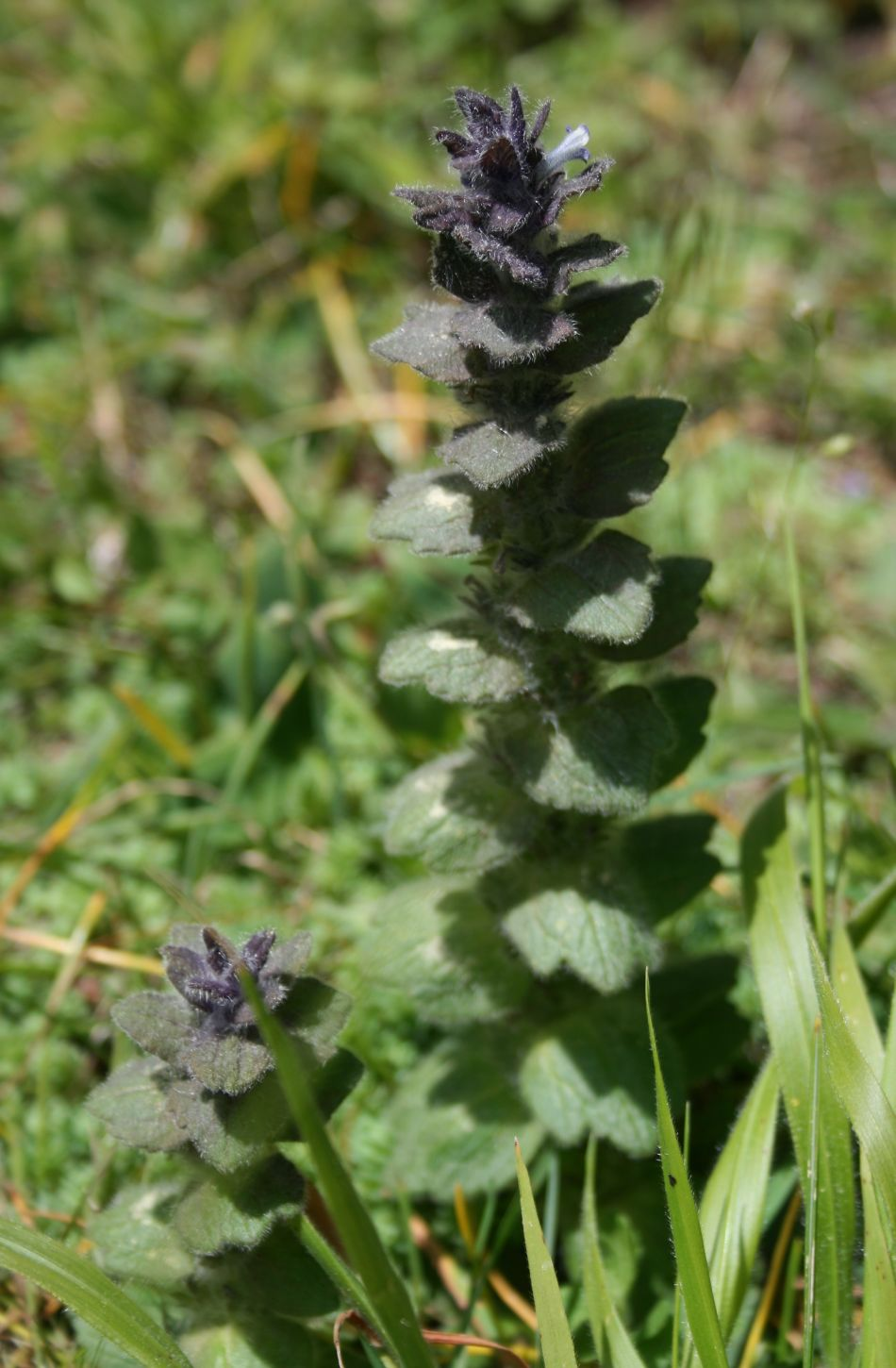 Ajuga orientalis, Lippenblütler (Lamiaceae) - Türkei/Türkiye/Turkey: Prov. Bolu/Bolu ili, Köroğlu Dağları, 12-13 km S Bolu, ca. 1600 m